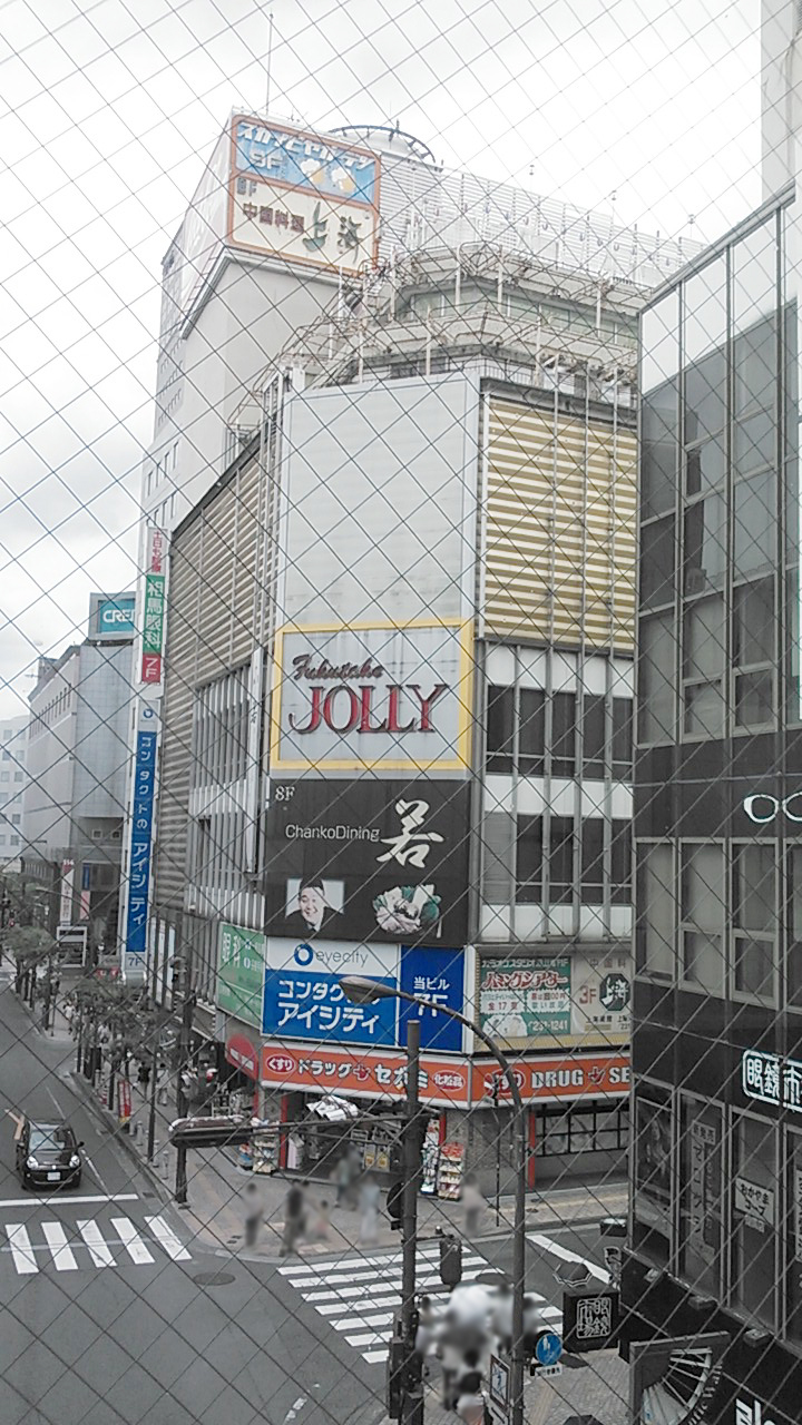 福武ジョリービル近影。天満屋ロッツ連絡通路より撮影